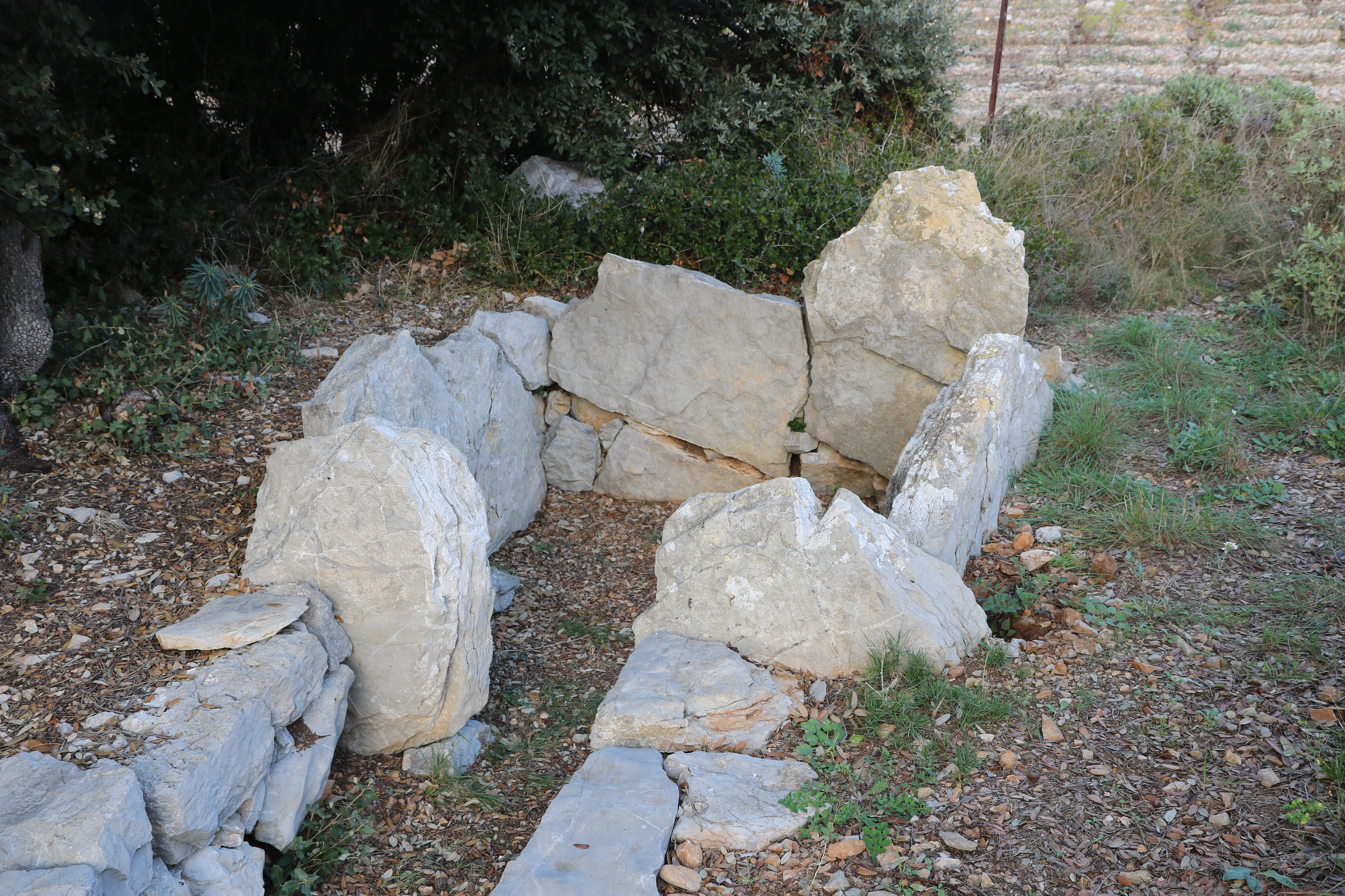 Frontignan (Hérault) - dolmen (détail)